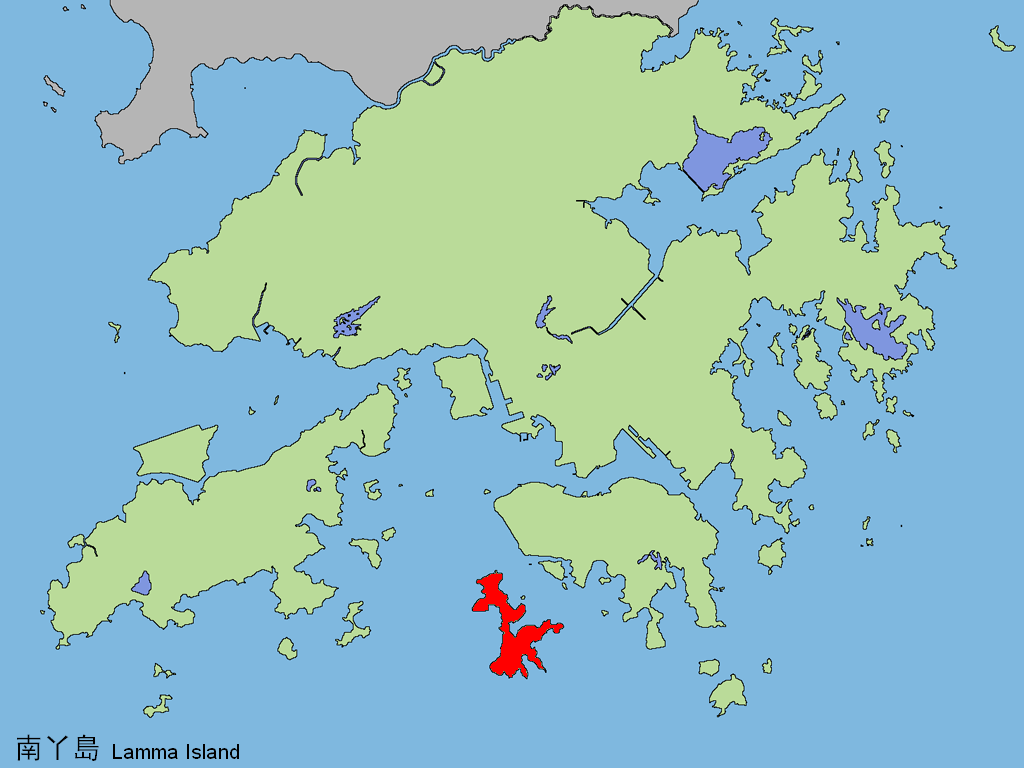 中文（香港）: 南丫島。